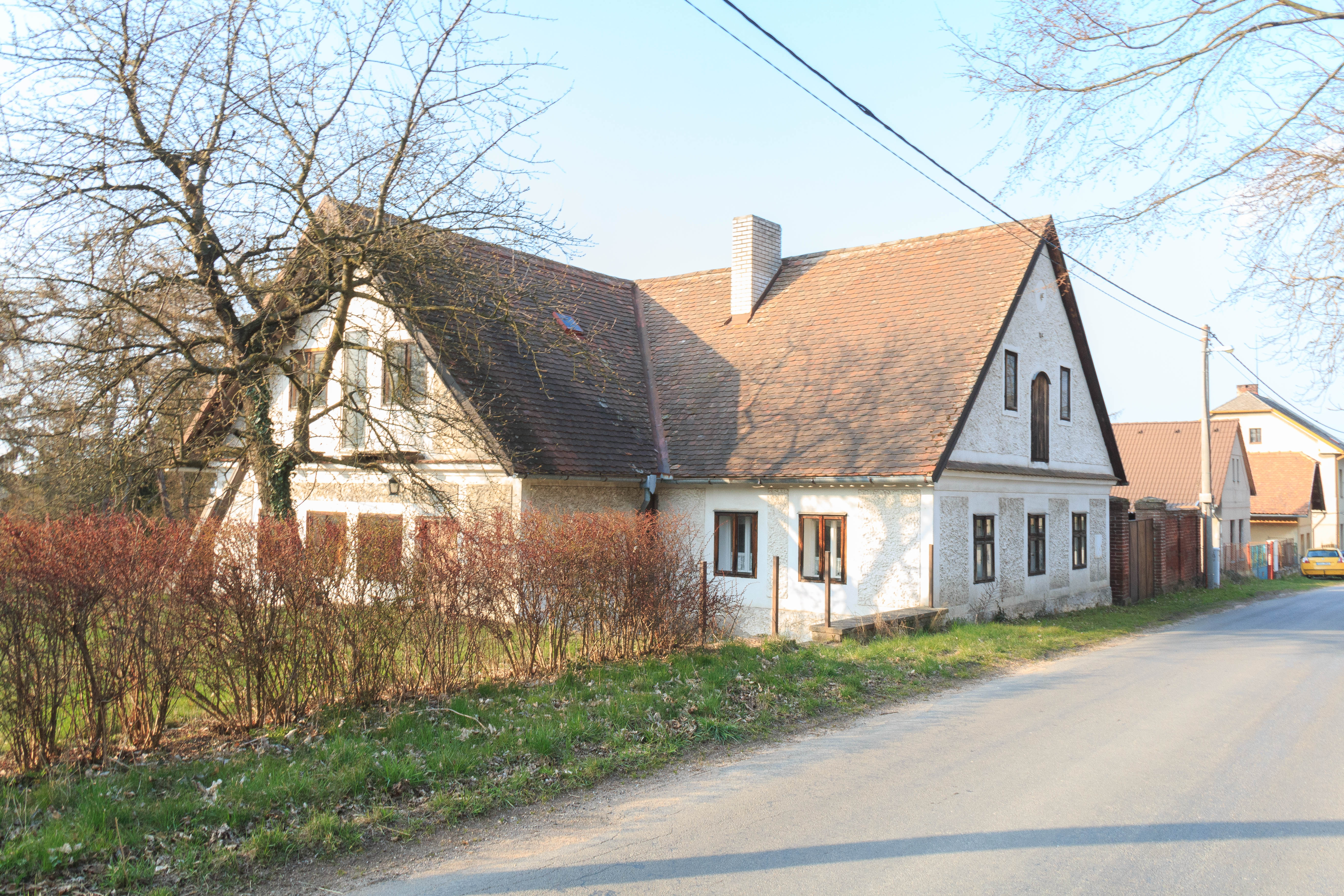 Skála čp. 10